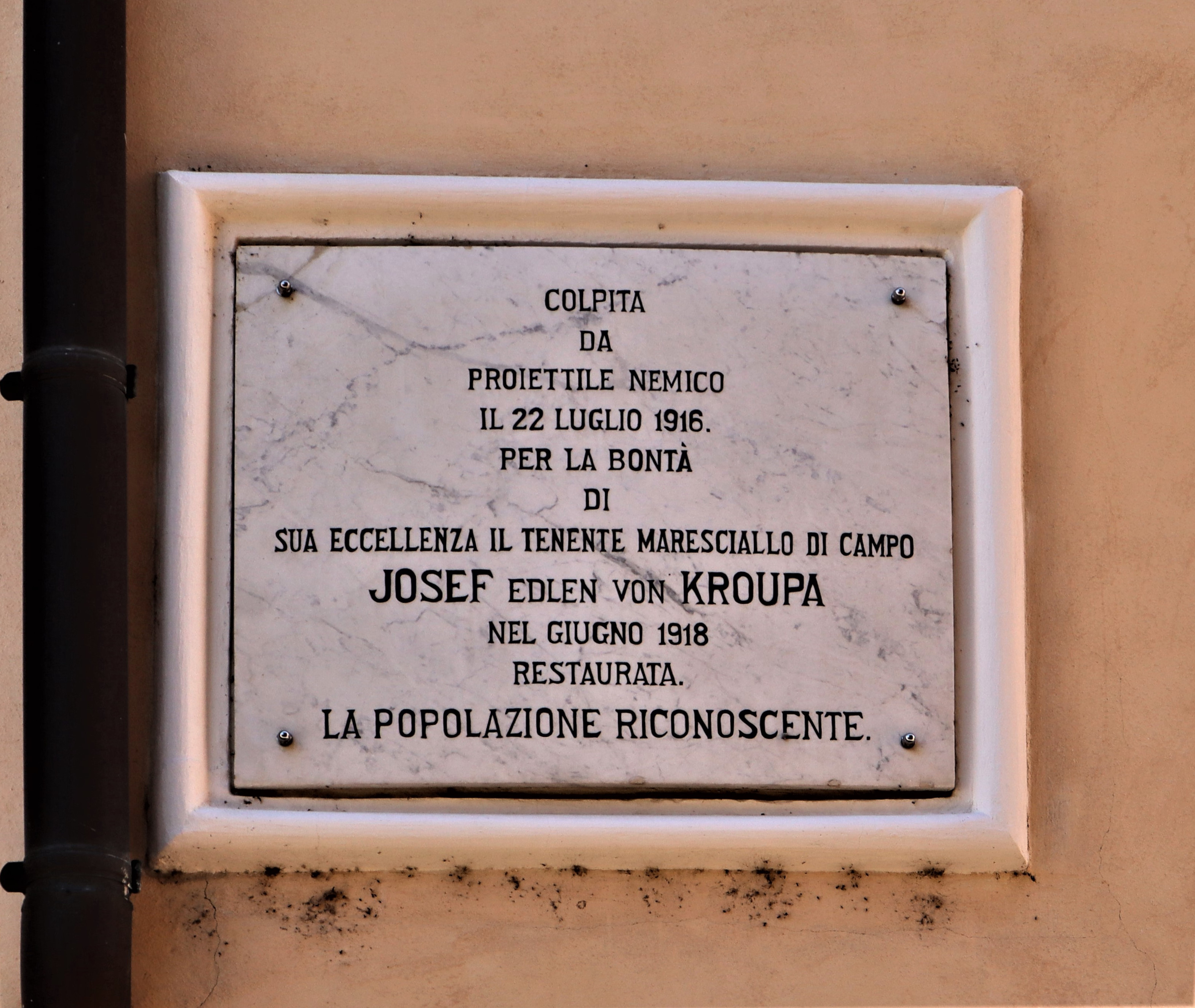 Chiesa parrocchiale della Purificazione di Maria di Volano in Trentino. Esterno. Lapide sulla facciata meridionale.